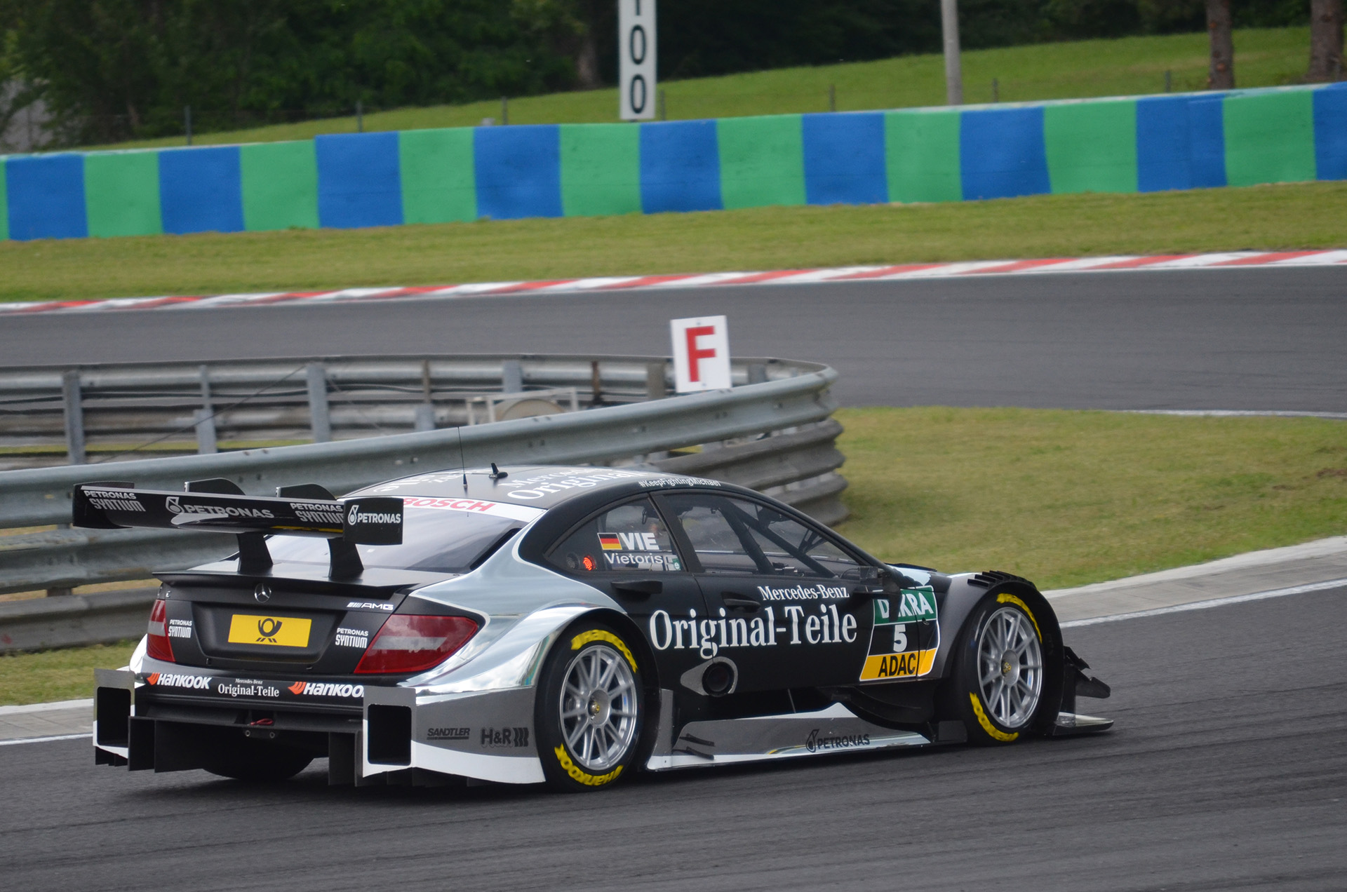 Christian Vietoris a DTM 2014-es magyar futamán.